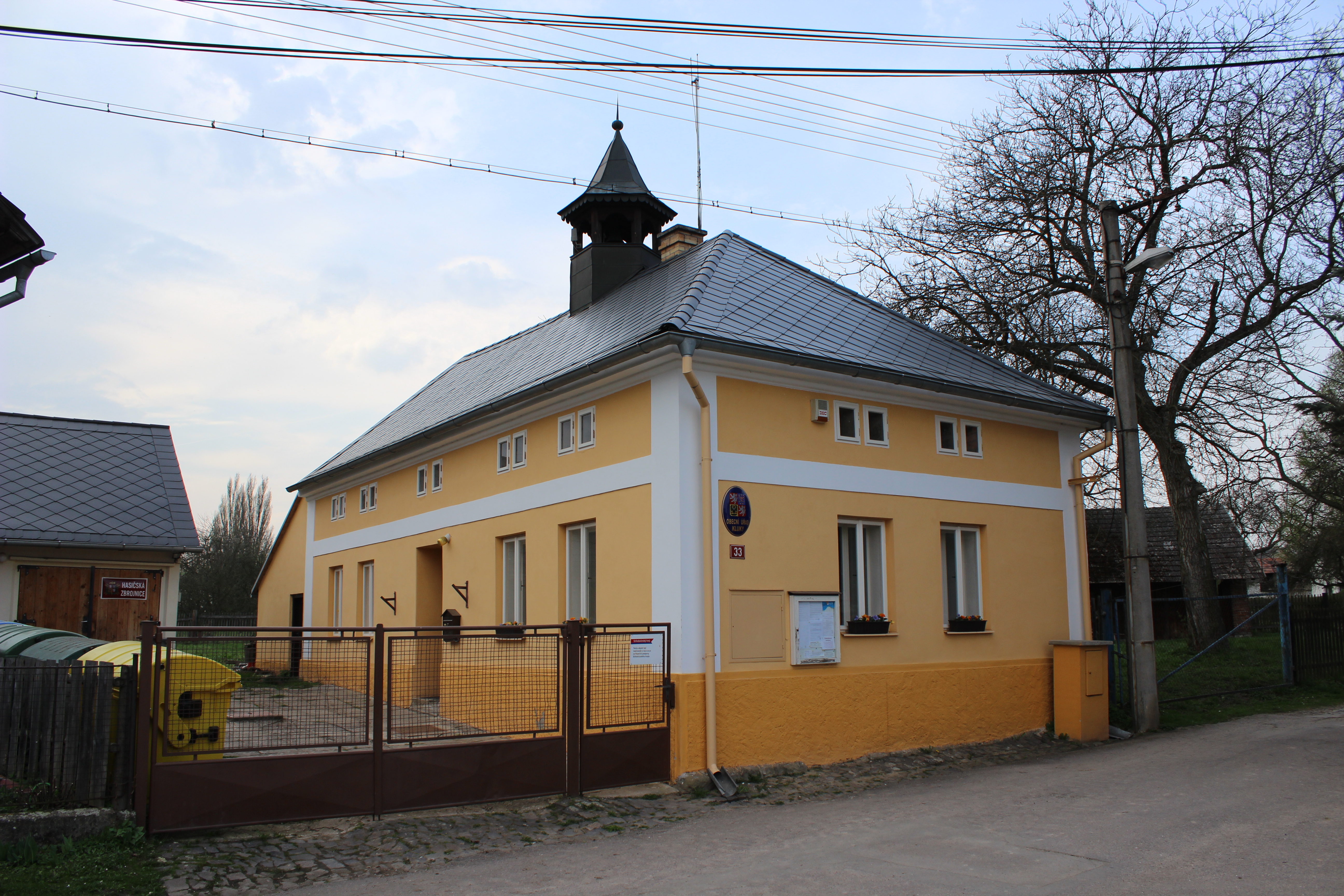 Obecní úřad v domě číslo popisné 33 v Klukách. This photograph was taken with a Canon EOS 600D.